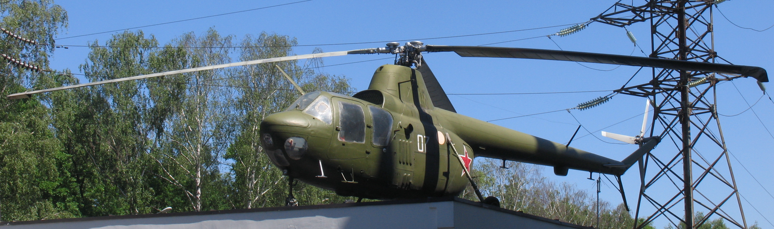 Ми-1У в Музее техники Задорожного.